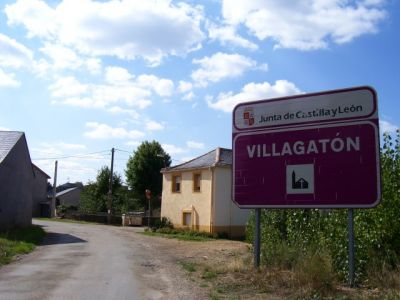 Entrada antigua al Pueblo de Villagatón en León (España)